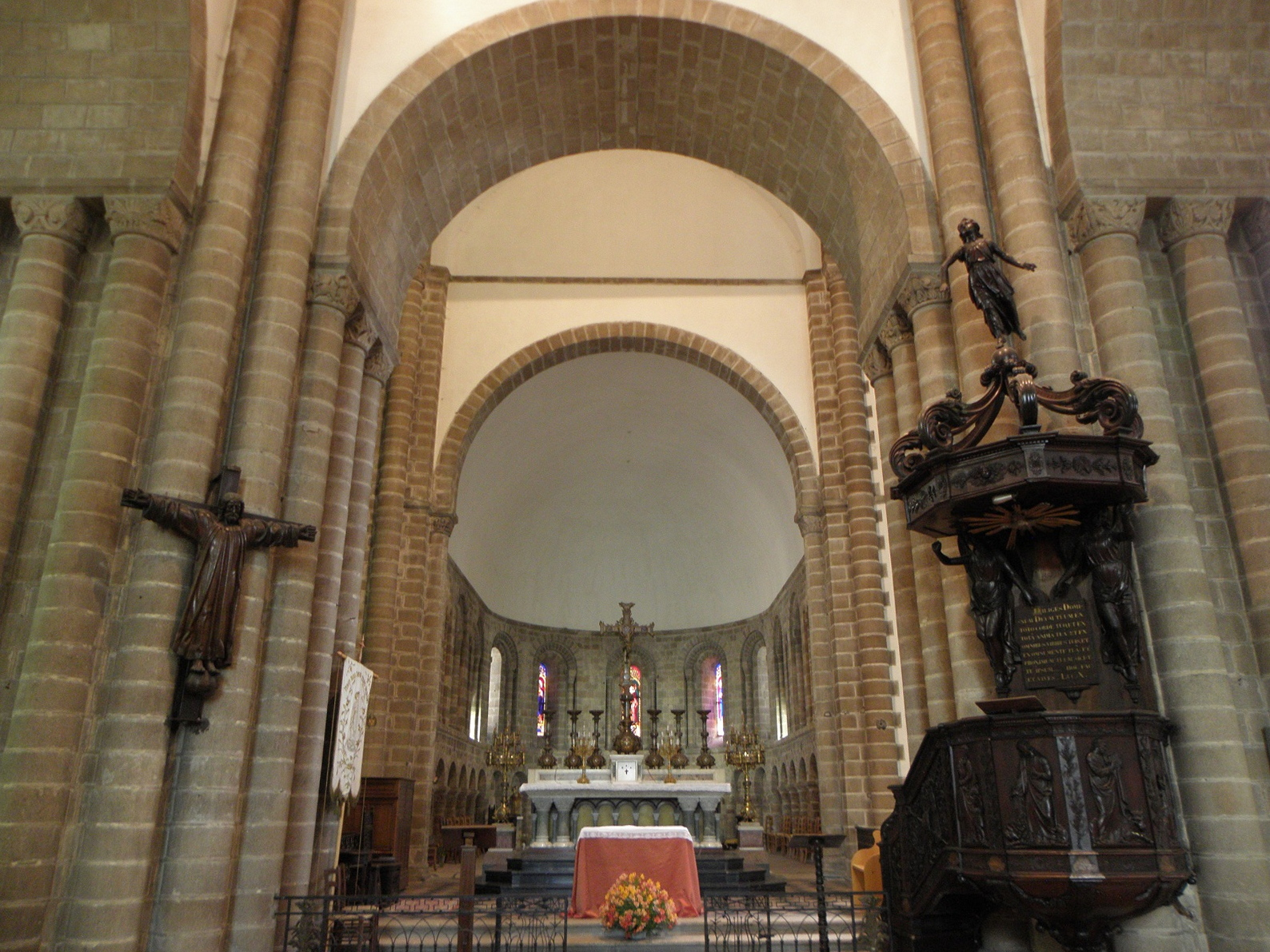 Chœur de l'abbatiale Sainte-Croix de Quimperlé (29).